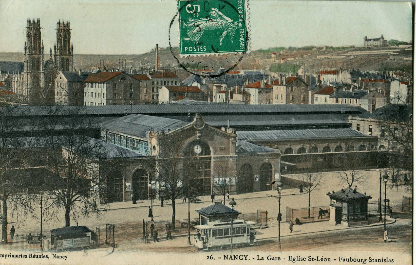 Carte postale ancienne éditée par les Imprimeries Réunies à Nancy, n°26 : NANCY - La gare - Église Saint-Léon - Faubourg Stanislas